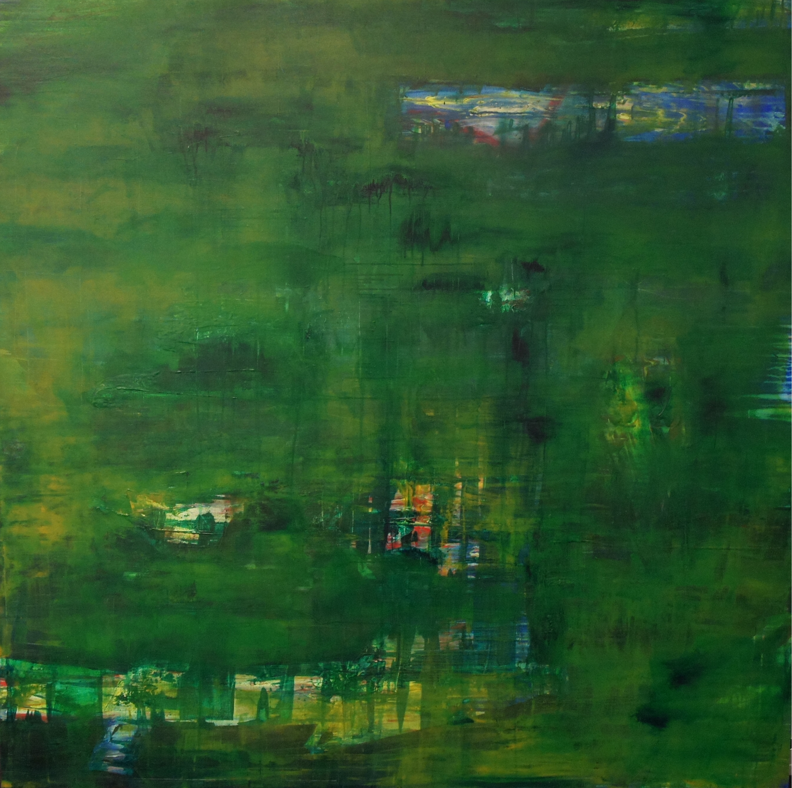 Obra de Franchini (Tela 150X150 cm, S linho)